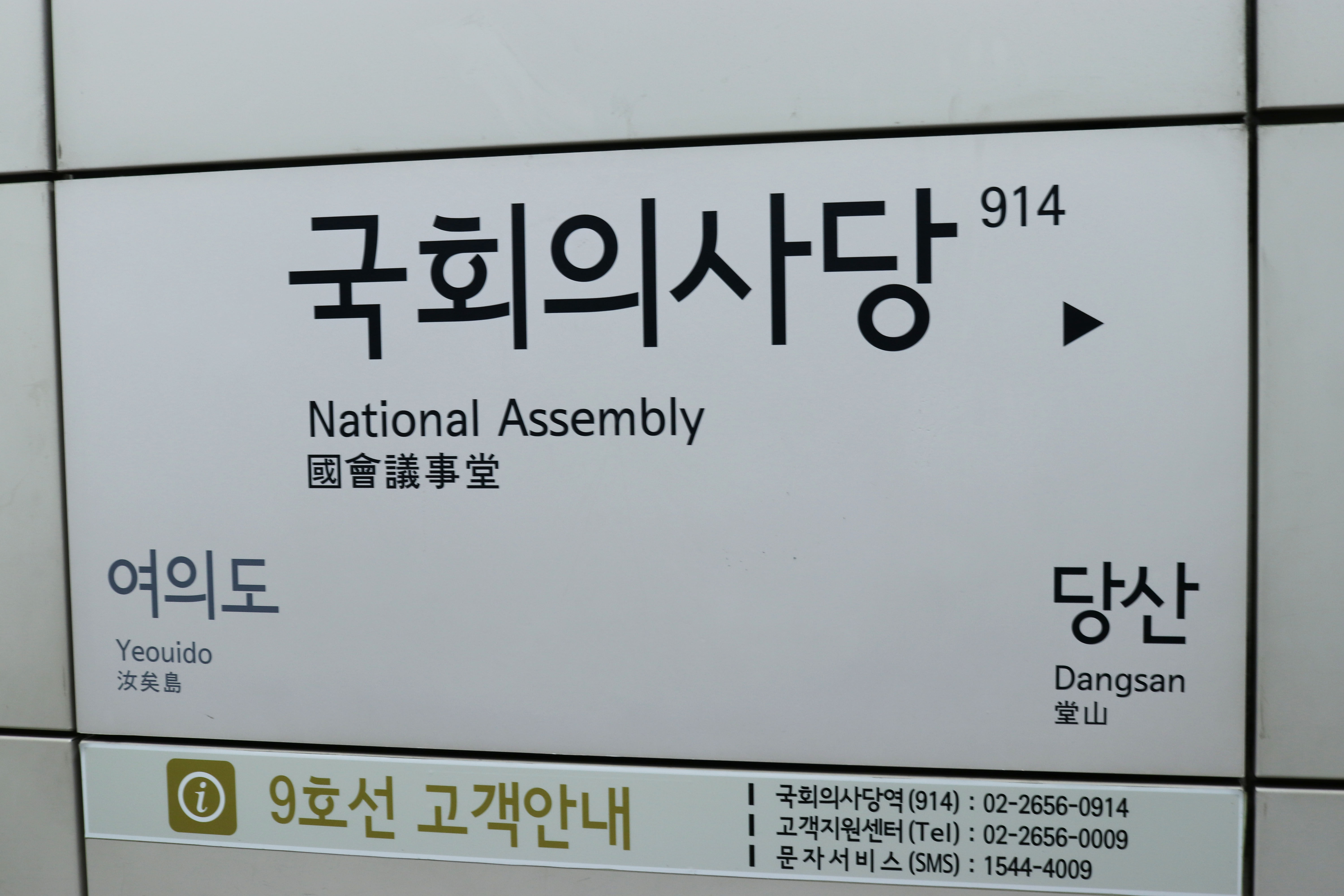 국회의사당역 역명판